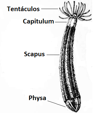 Anatomía de Edwardsia claparedii ,a partir de recorte de ilustración de E. Britannica, Commons.